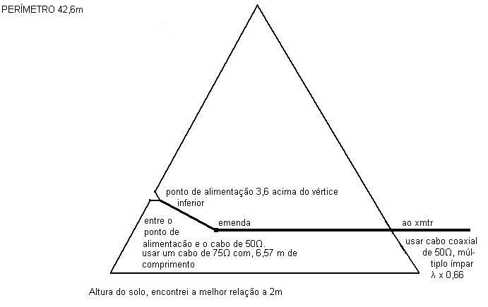 A Antena Delta loop construída por PY5AAL (Utilizando um stub no sistema bazooka), basicamente segue o mesmo princípio da antena quadra-cúbica, porém sua forma em triângulo facilita a sua instalação em mastros quando na posição vertical. A antena delta-loop pode também ser utilizada, da mesma forma que a quadra-cúbica ditada, ou seja na posição horizontal, paralela ao solo. Existem radioamadores que utilizam-na com refletor, e outros como antena multibanda.